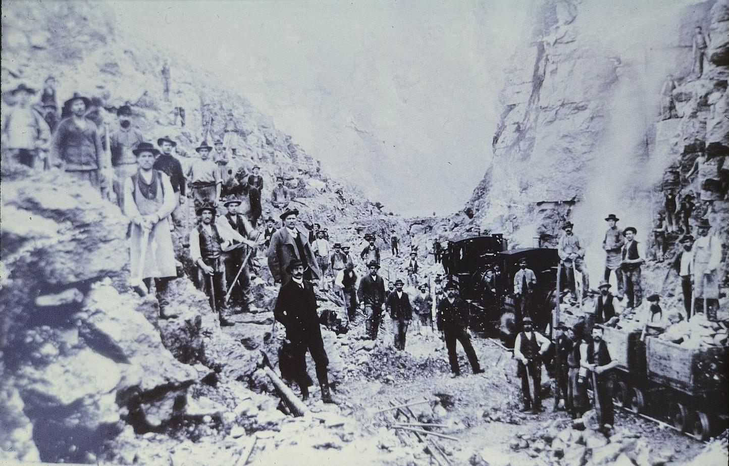 Photo - Bahnstrecke Treuchtlingen-Augsburg - Arbeiten am Bergdurchstich im Möhrenbachtal